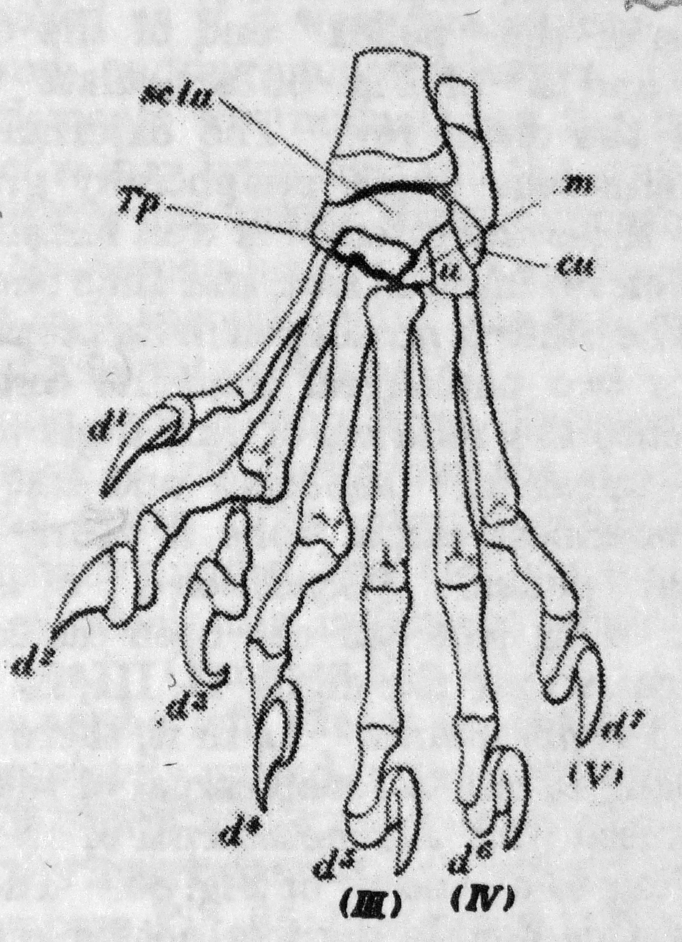 Katze Vorderfuß links polydaktyl